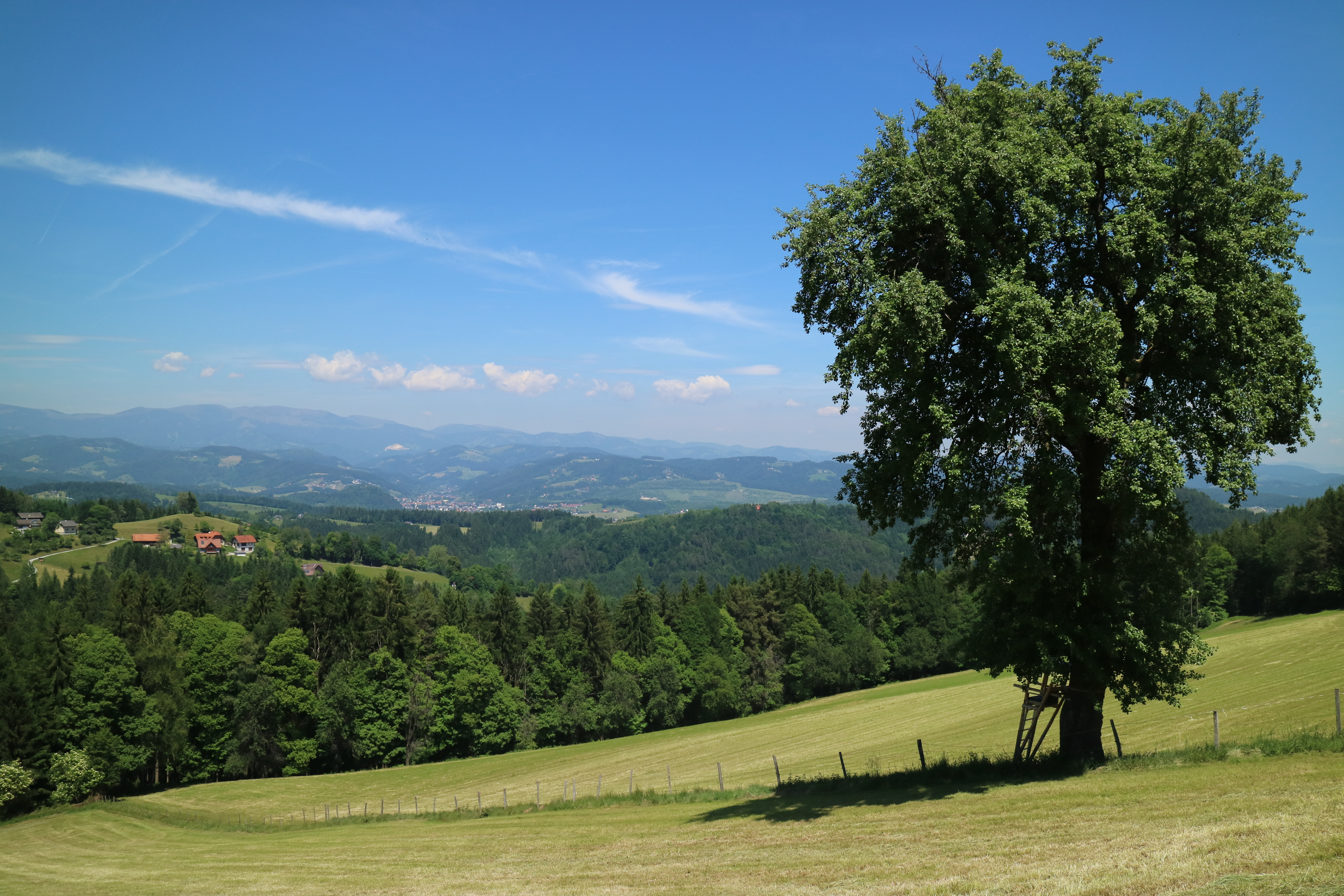 Landschaft bei Großwöllmiß (Gemeinde Sankt Martin am Wöllmißberg), Steiermark